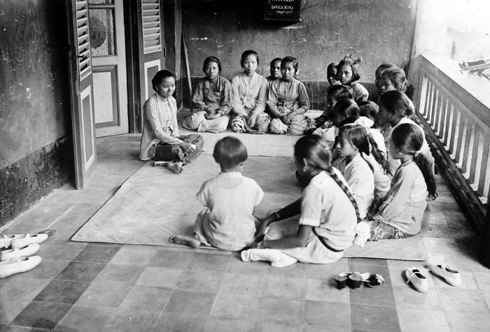 Repronegatif. Ibu Soerjoadipoetro sedang berbincang-bincang dengan siswi-siswi National Onderwijs Instituut (Lembaga Pengajaran Bangsa) "Taman Siswa" di Bandung